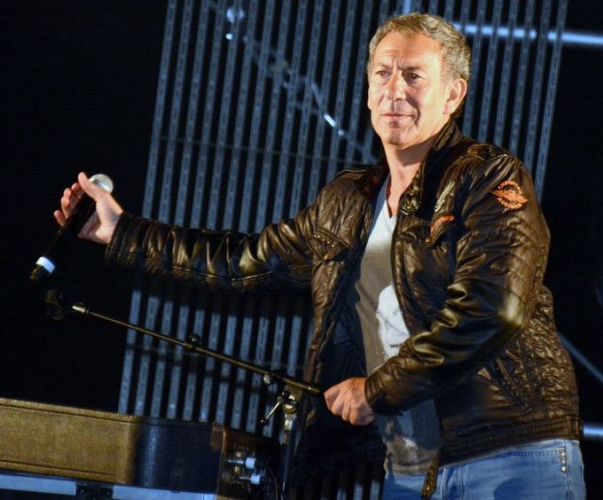 François Feldman au concert "La Folie des années 80" à Enghien-les-Bains